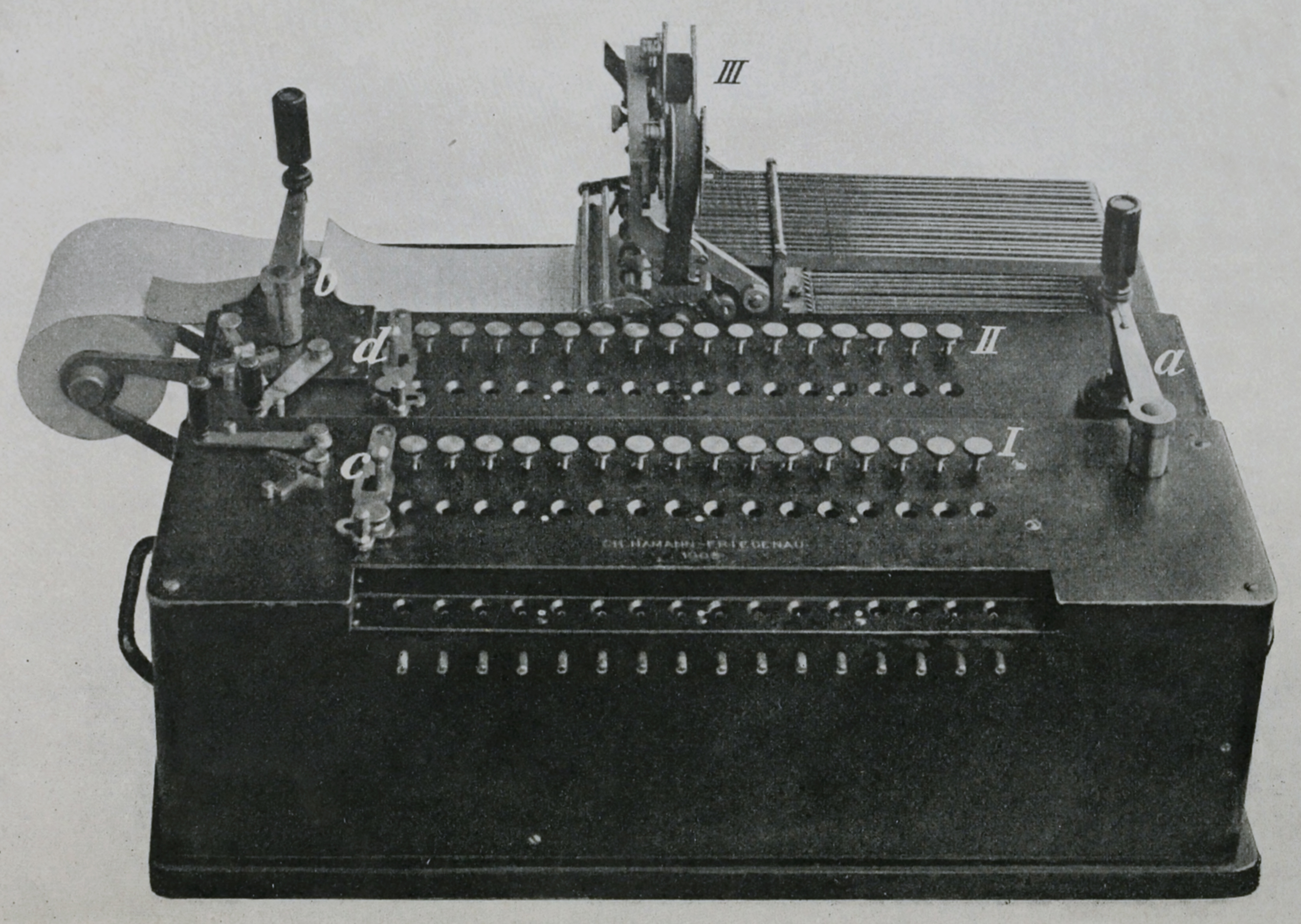 Die Maschine besteht aus zwei gleichartigen von einander unabhängigen Rechenmaschinen I und II zu je 16 Stellen und dem Druckwerk III. Jede der beiden Maschinen besteht wiederum aus einem Schalt- und einem Zählwerk. Die Arbeitsweise ist folgende: Ein im Schaltwerk von I befindlicher Wert wird durch eine Drehung der Kurbel a zu dem im Zählwerk I und zugleich im Schaltwerk II befindlichen Wert hinzugelegt, und zwar entweder im positiven oder negativen Sinne, je nachdem die Maschine durch den Hebel C auf Addition oder Subtraktion geschaltet ist. Eine nunmehrige Drehung der zweiten Kurbel b legt den im Schaltwerk II stehenden Wert zu dem im Zählwerk II stehenden hinzu, ebenfalls wieder in positivem oder negativem Sinne, je nachdem der Hebel d auf Addition oder Subtraktion geschaltet ist. Durch die Drehung der Kurbel b wurde auch zugleich das zum Druckwerk gehörige Schaltwerk, entsprechend dem im Zählwerk von II stehenden Wert, eingestellt. Eine weitere Umdrehung der Kurbel a addiert bzw. subtrahiert wiederum den im Schaltwerk I stehenden Wert zu dem im Zählwerk I befindlichen, zugleich wird aber auch bei jeder Umdrehung der Kurbel a das Druckwerk betätigt, und zwar gelangt der jedesmal im Zählwerk II stehende Wert zum Abdruck.